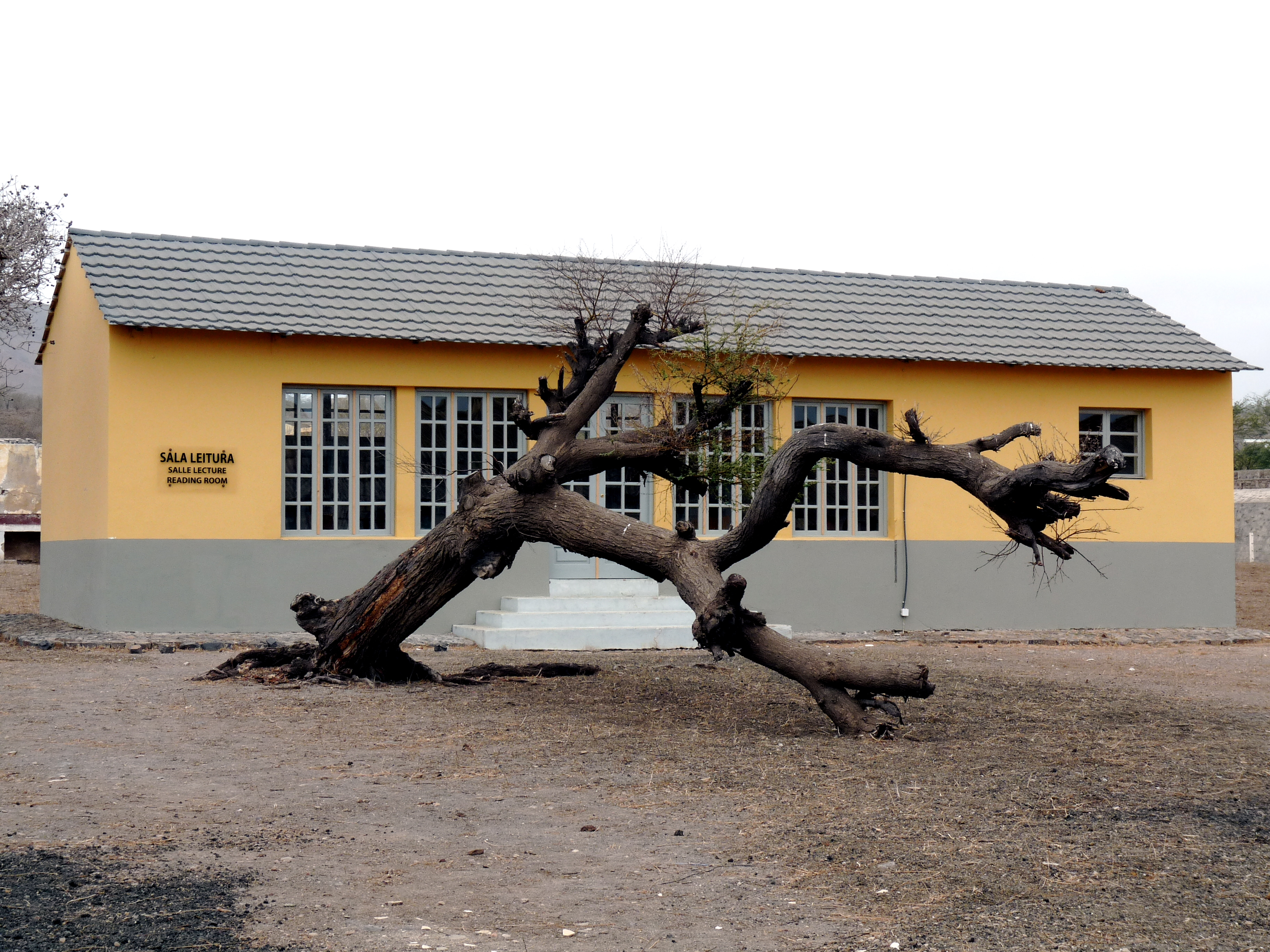 Antigo Campo de Concentração do Tarrafal, Ilha de Santiago - Cabo Verde / Old Concentration Camp in Tarrafal, Santiago Island - Cape Verde